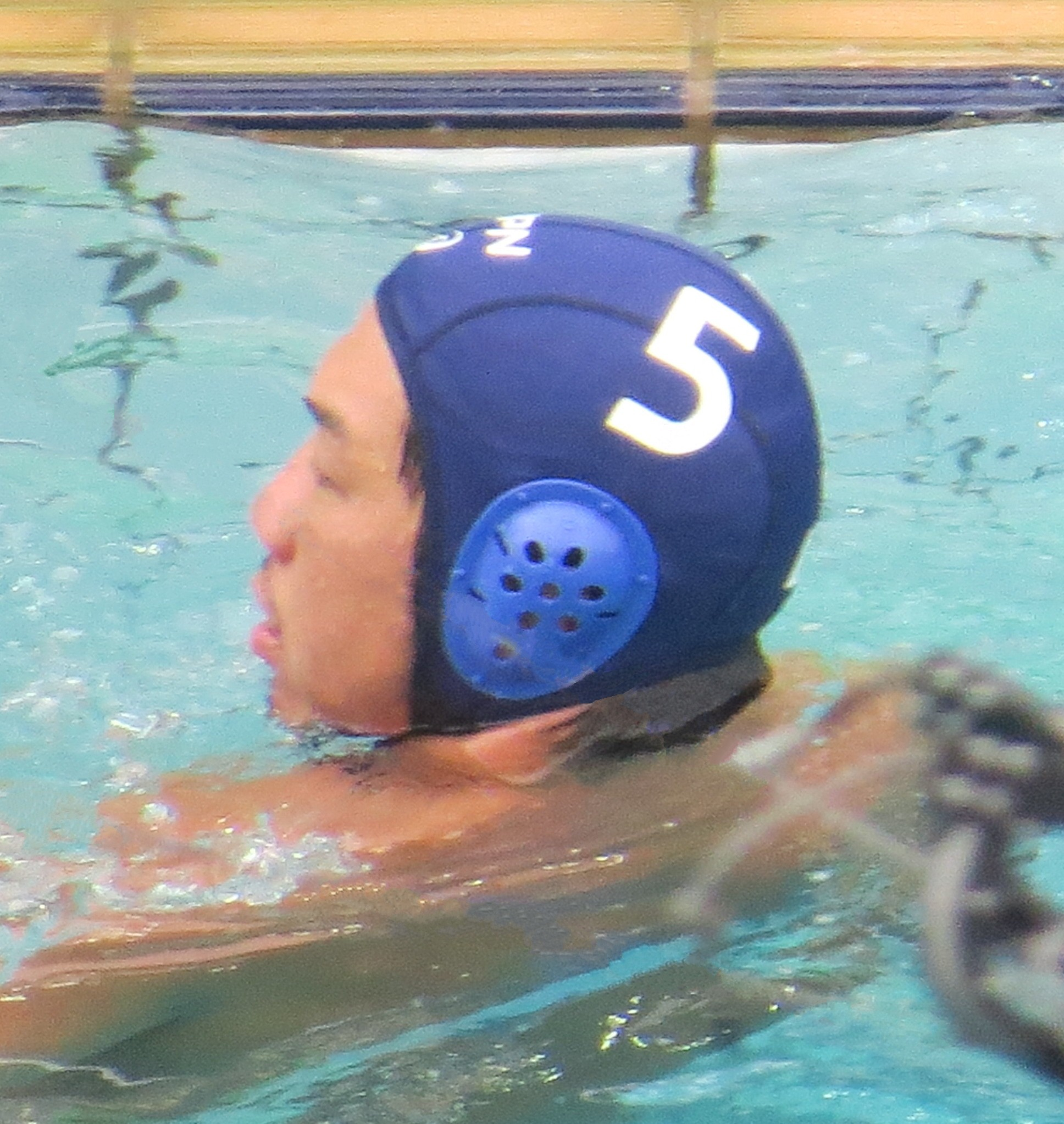 Rio 2016. Polo aquatico. sx50 90